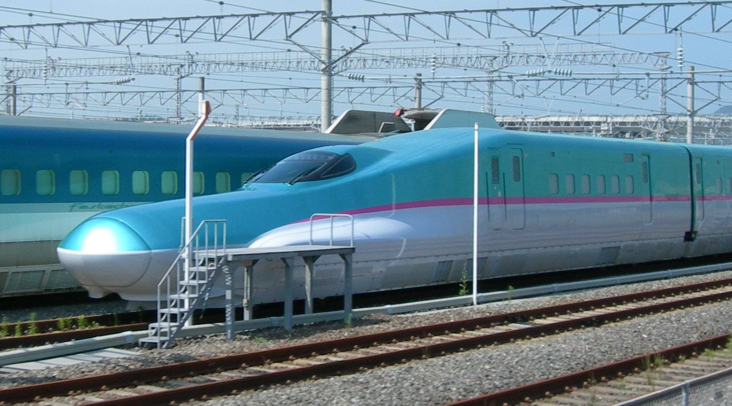 E5 Shinkansen series E523-1